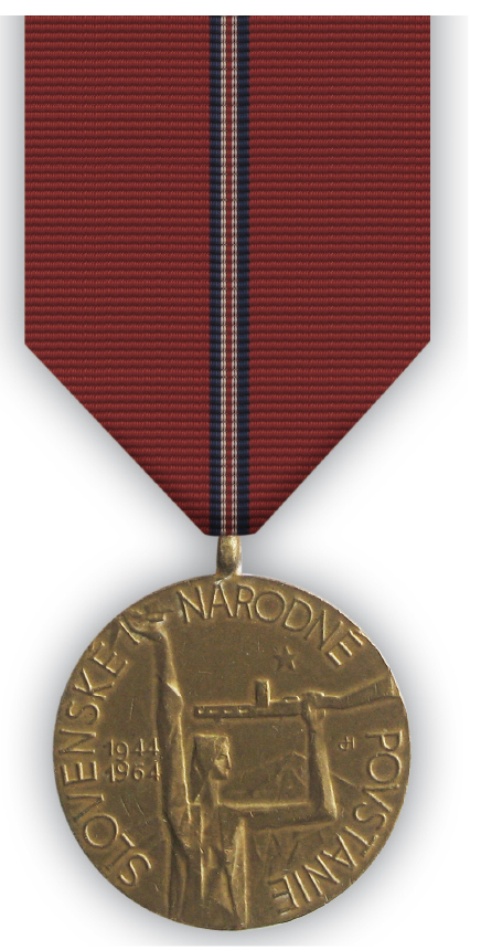 Pamätná medaila k 20. výročiu Slovenského národného povstania